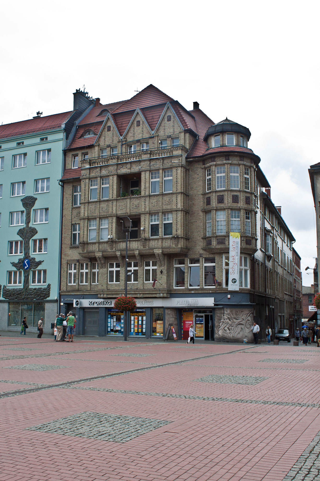 Kamienica z 1910 r. Rynek 26, Krawiecka 1. Bytom